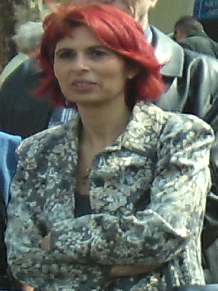 Portrait Cornelia Hoffmann-Bethscheider